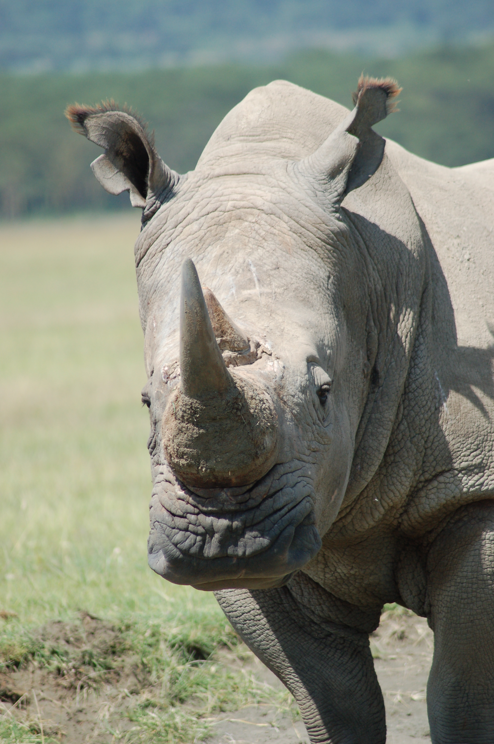 Lake Nakuru Kenya, Feb 2007